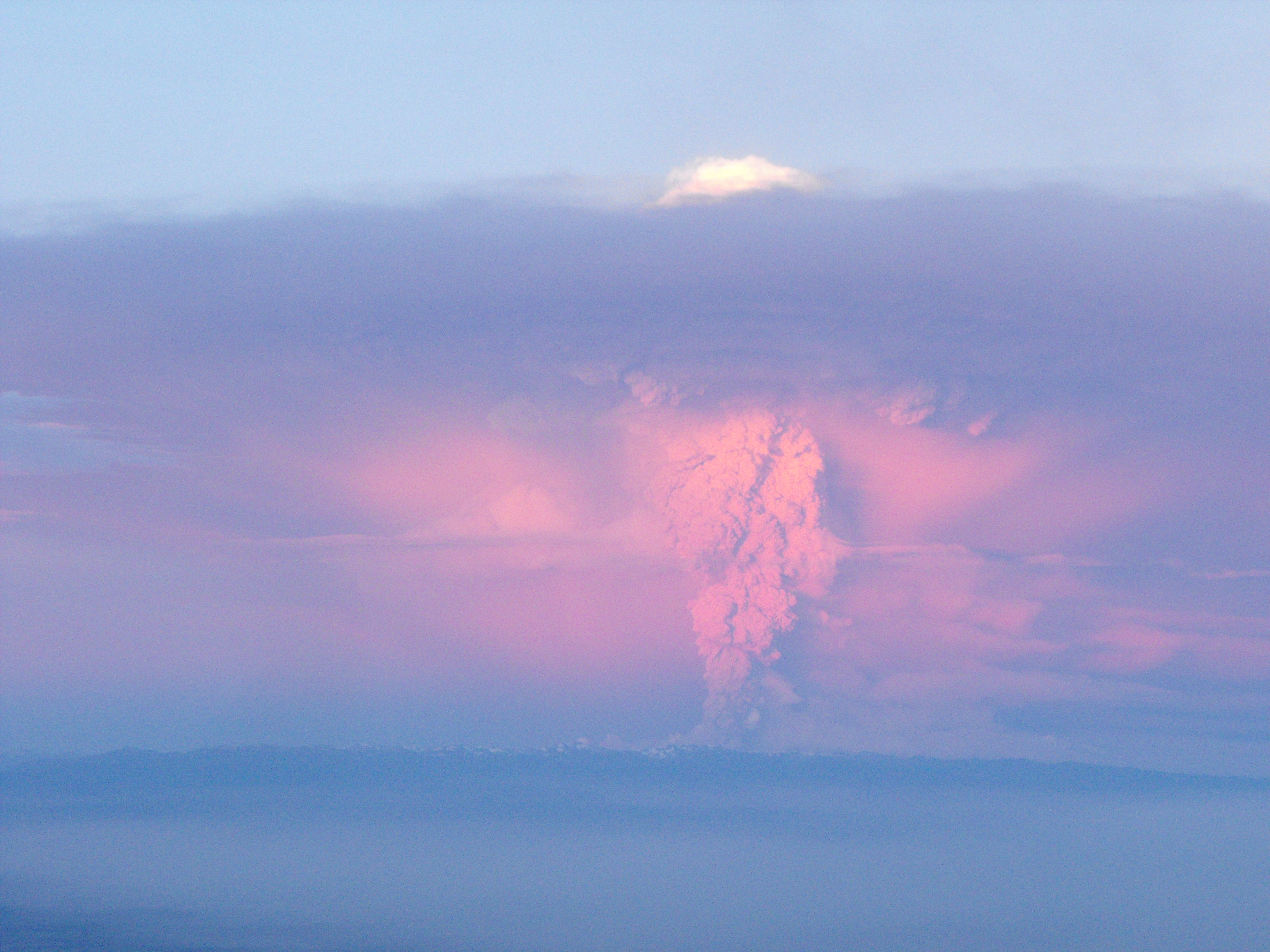 Fotografía desde el aire de la erupción del Cordón Caulle, Puyehue, Region de Los Lagos, Chile. June 5th, 2011. 17:45